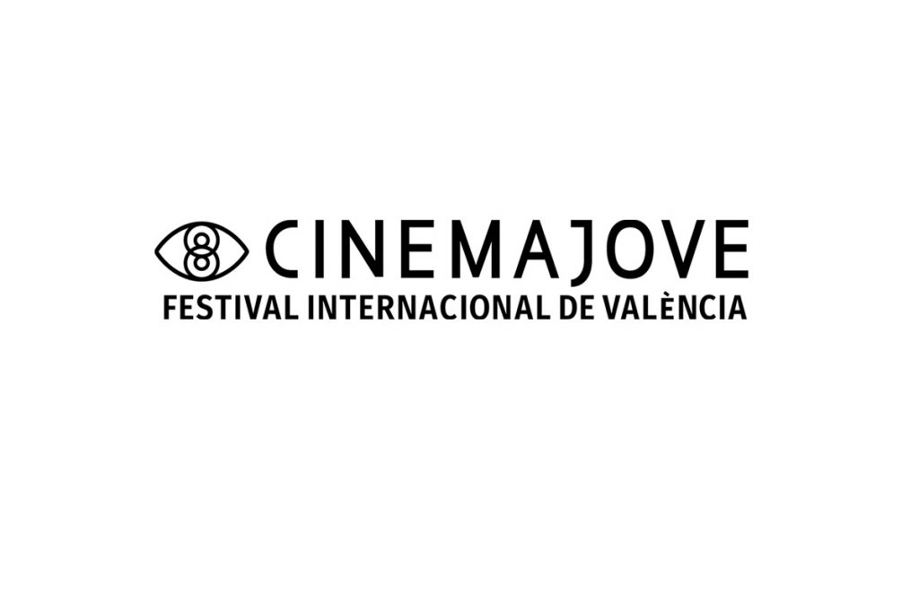 Logo de Cinema Jove